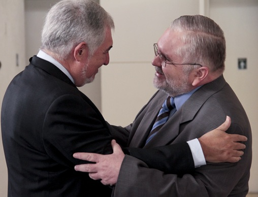 El Fiscal General de España con el Fiscal General de Brasil en 2011.